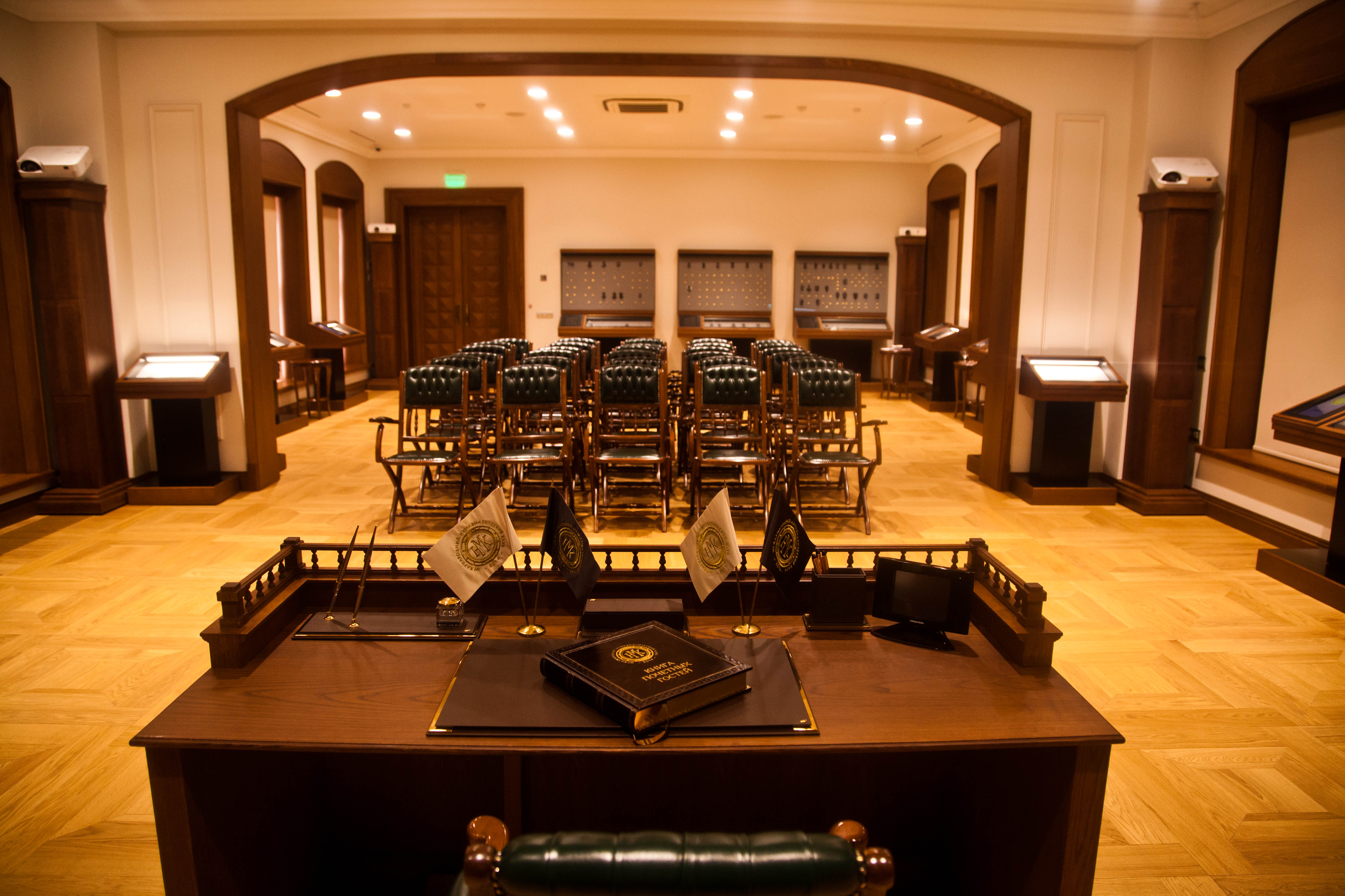 Музей Международного нумизматического клуба, Москва